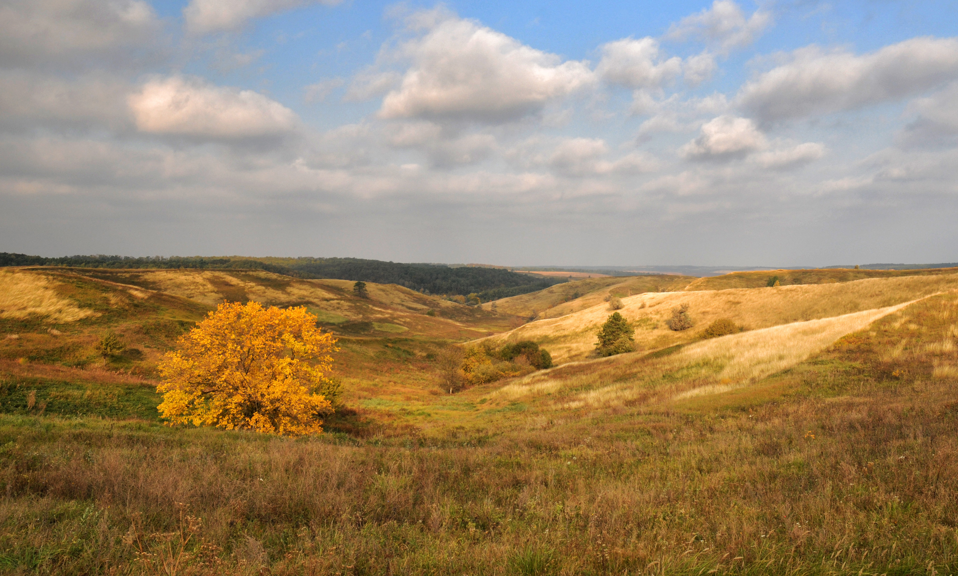 Регіональний ландшафтний парк "Трахтемирів"